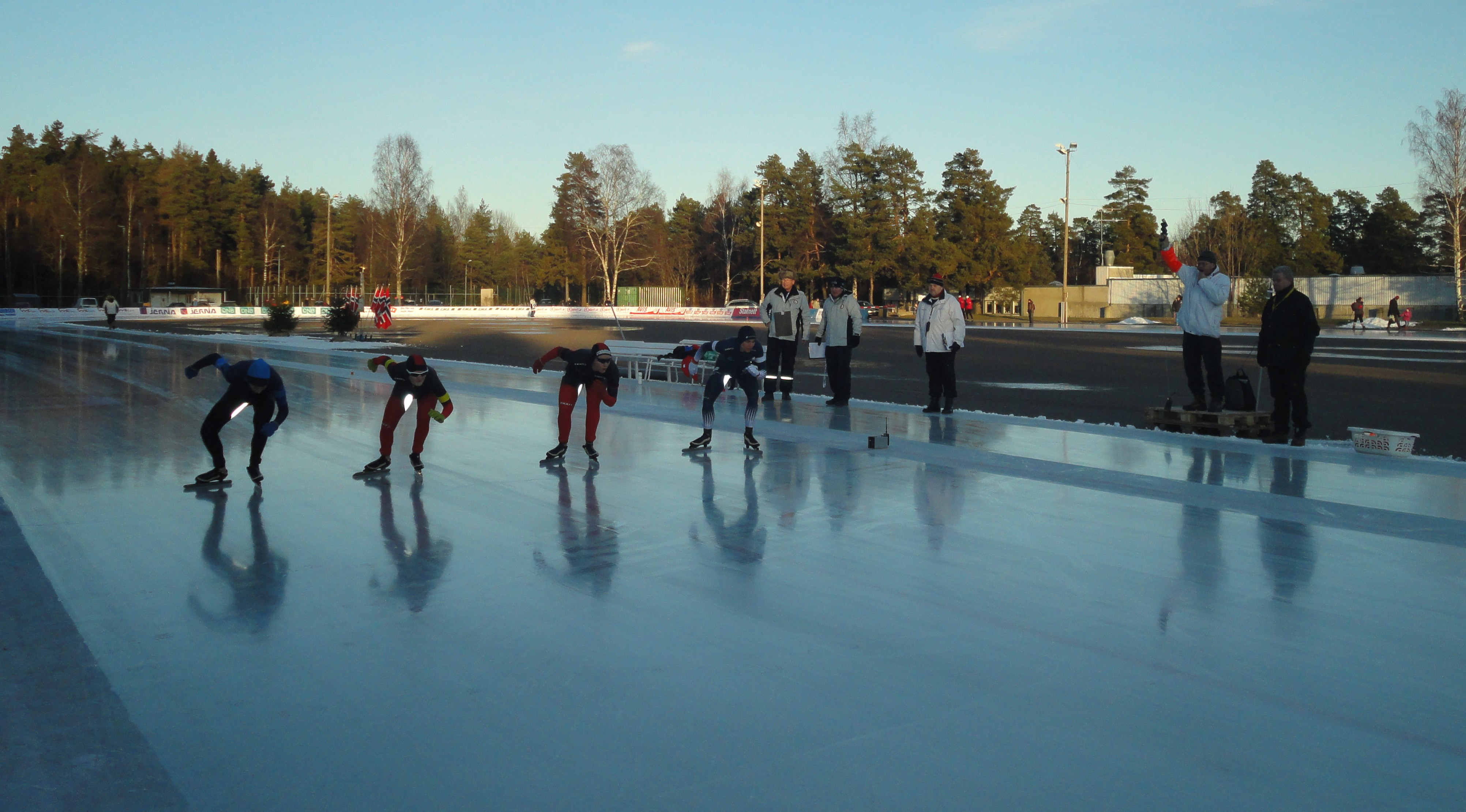 Siste distanse, 1. kvartett damer på start under Allround-NM på skøyter 2012 i Tønsberg, Norge. Fra venstre: Merete Tvedt (Asker SK), Camilla Lund (Leinstrand IL), Maren Charlotte Søfteland Jørgensen (Arendal SK) og Marit Fjellanger Bøhm (Stavanger SK). Starteren med start-pistolen er Jan Wiggo Oxholm (IF Fram).Unknown last distance 1. quartet ladies at start during the national championship in speedskating allround 2012 in tønsberg, norway. from left: merete tvedt (asker sk), camilla lund (leinstrand il), maren charlotte søfteland jørgensen (arendal sk) og marit fjellanger bøhm (stavanger sk). the starter with the starter-gun is jan wiggo oxholm (if fram).